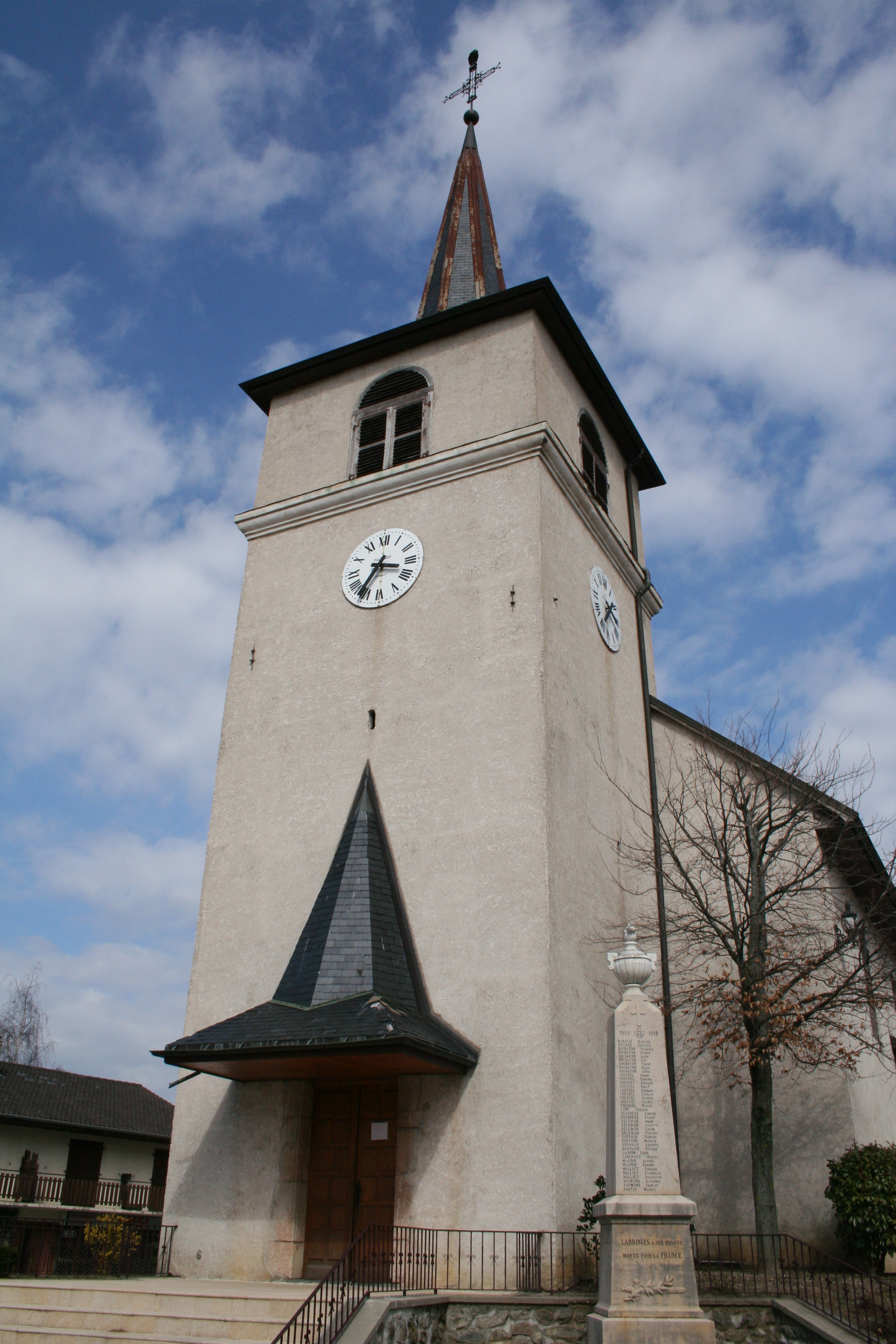 Eglise Saint Maurice de Larringes